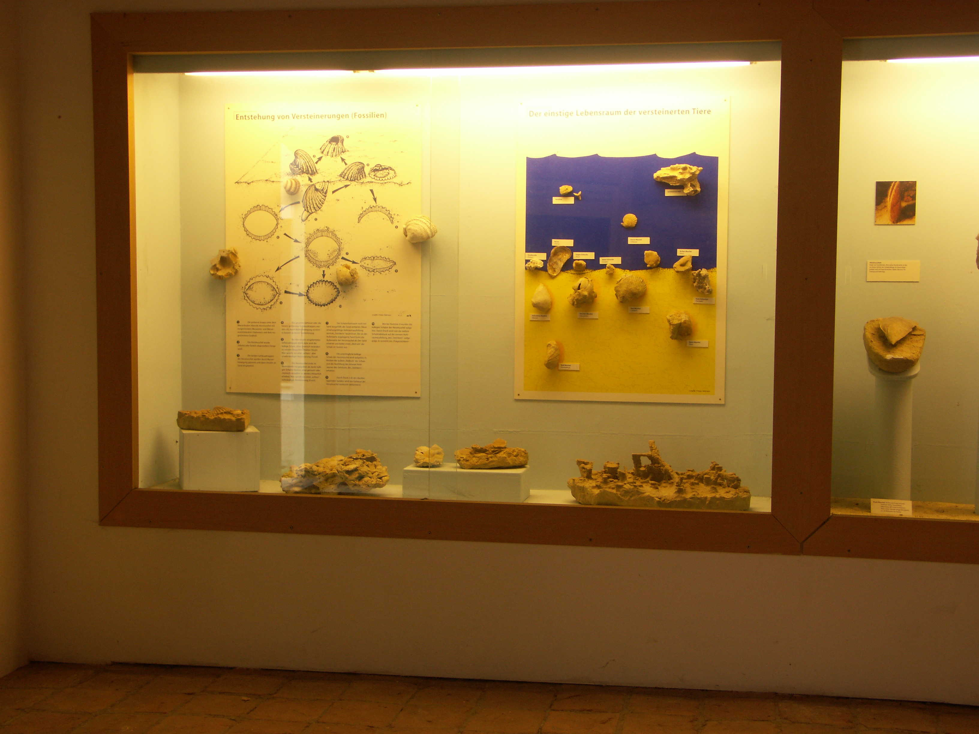 Fossilienschauraum Obernholz Vitrine